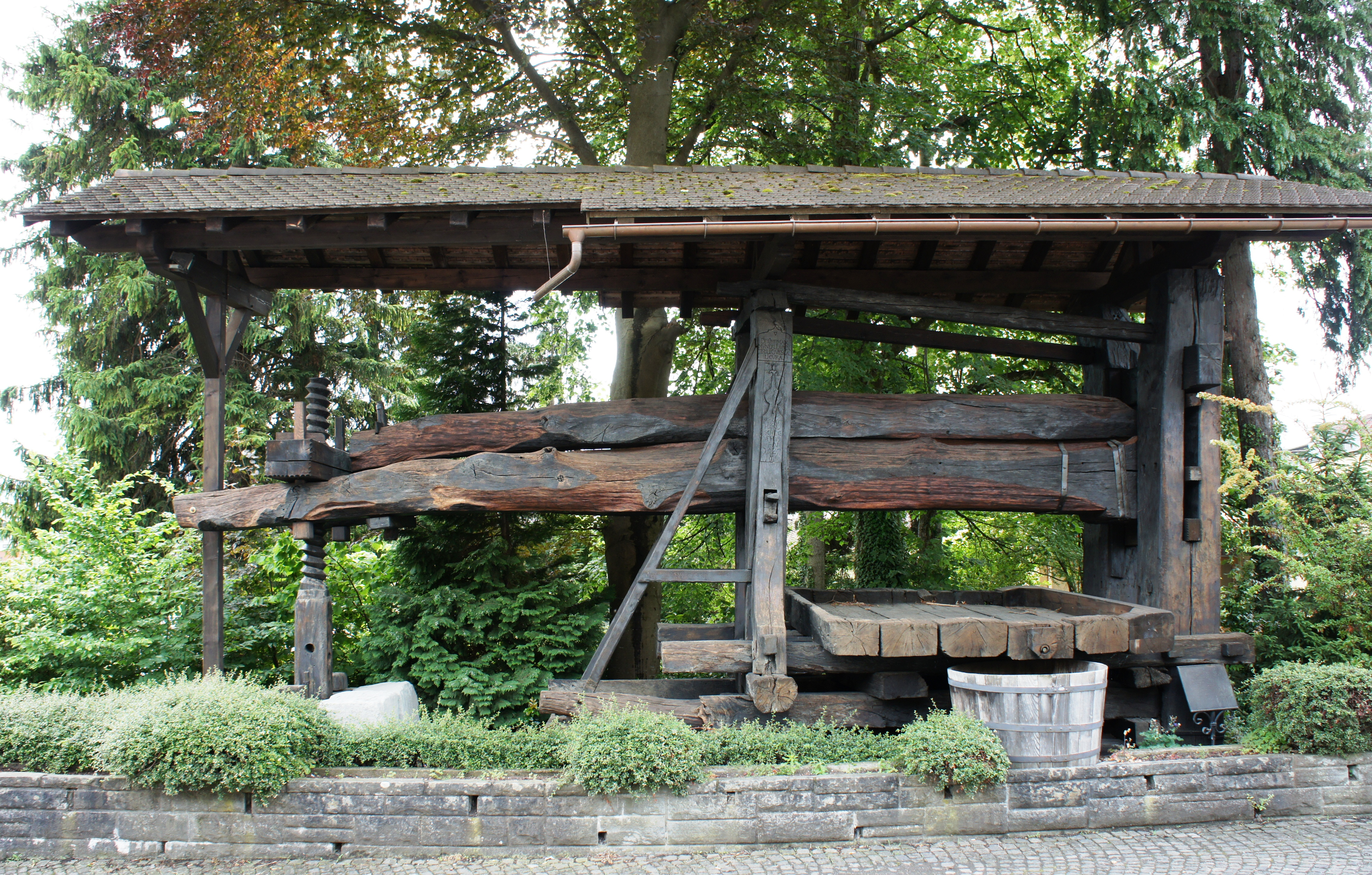 Alte Weinpresse neben dem Bad Balgach.